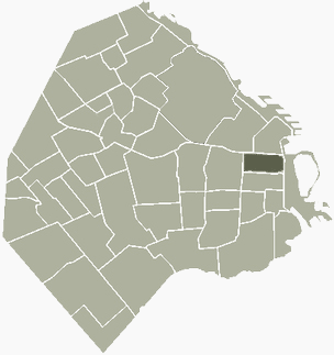 Barrio de San Nicolás